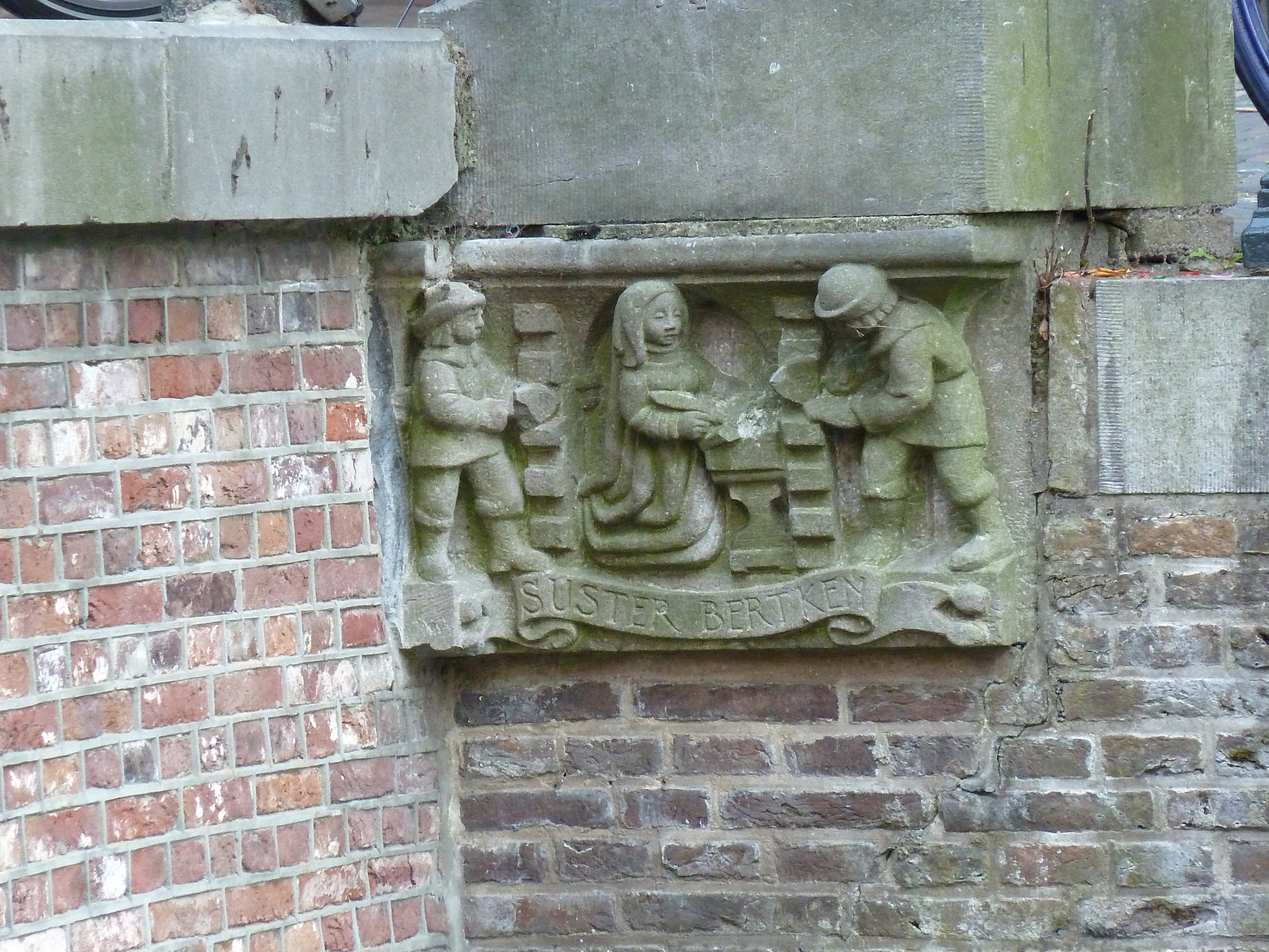 Straatlantaarnconsole Vismarkt thv Choorstraat, Utrecht, NL. Suster Bertken